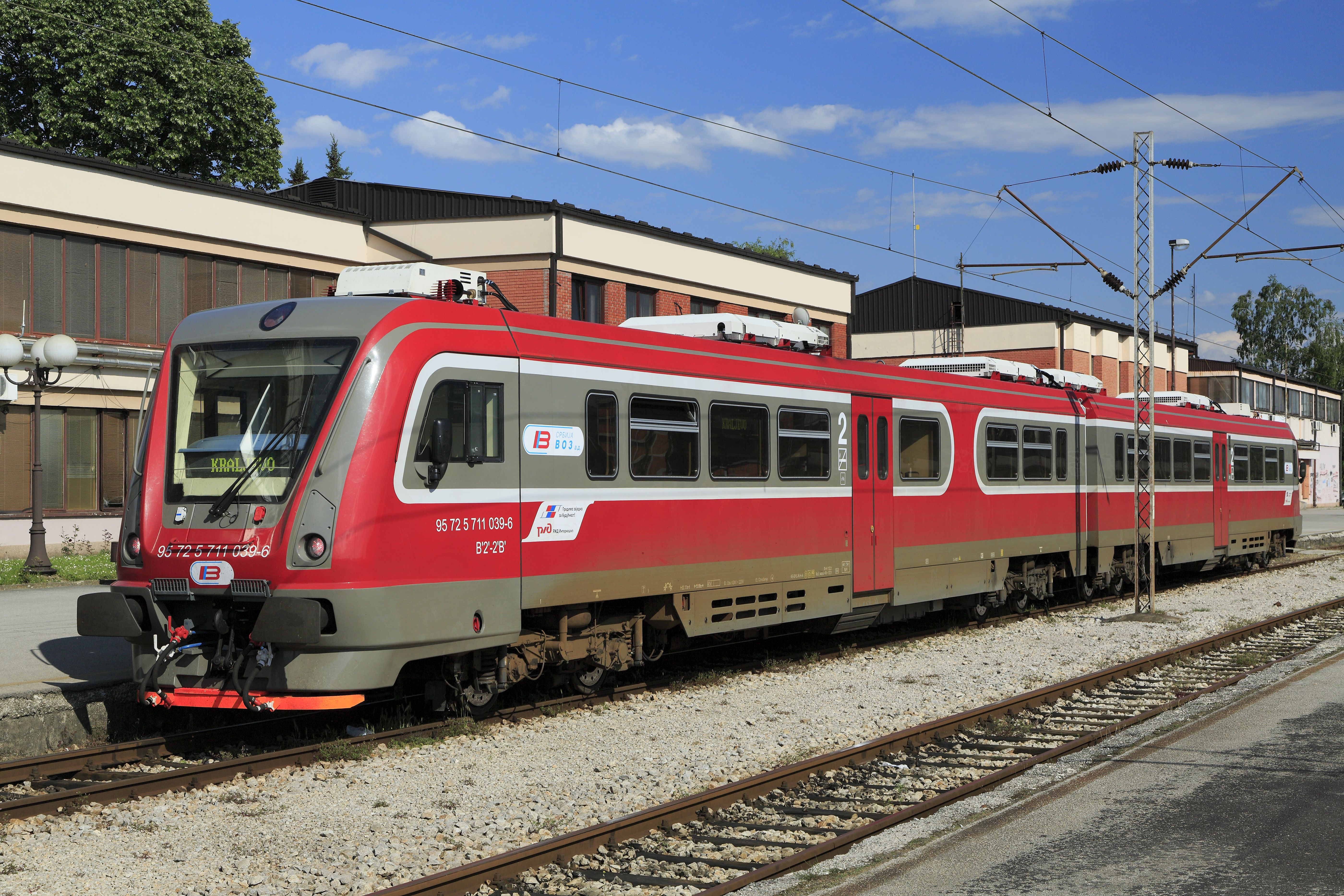 Dieseldoppetriebwagen, geliefert von Metrowagonmasch bei Moskau ab 2012.